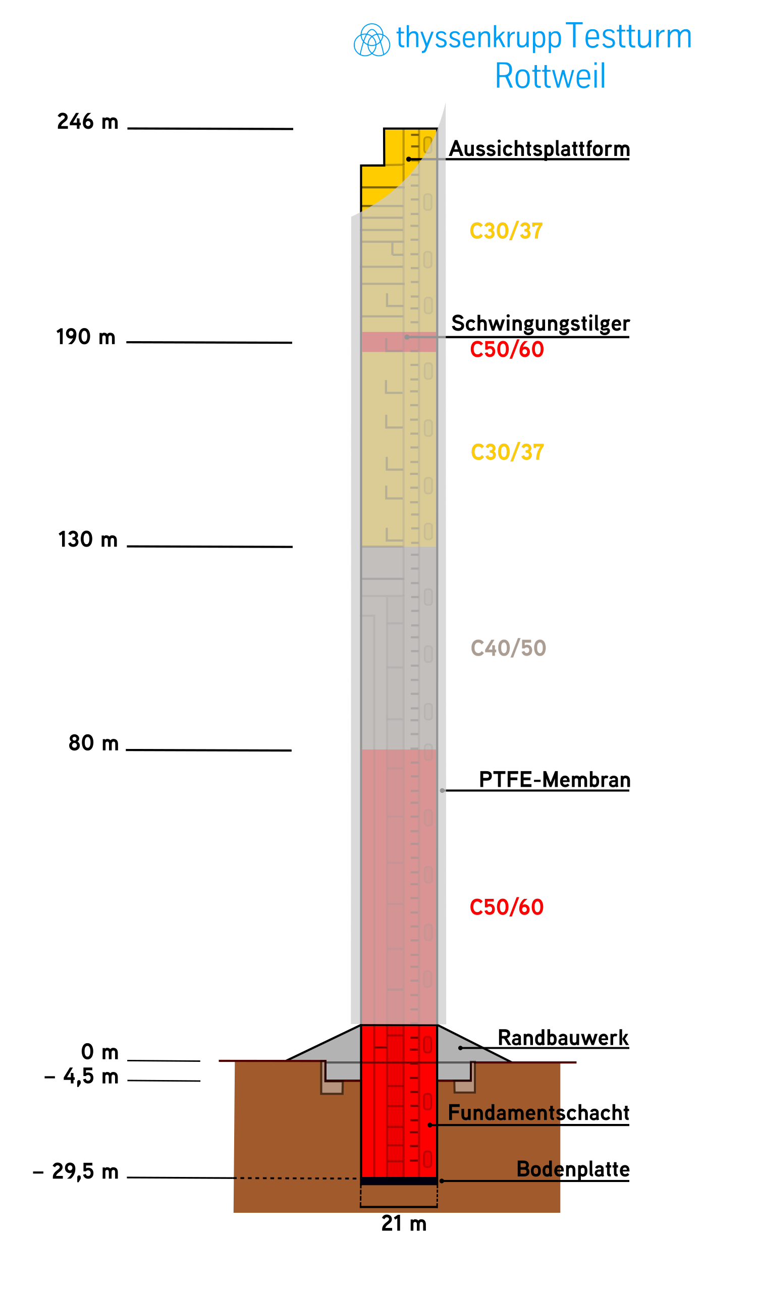 Schnittzeichnung des Thyssenkrupp Testturms in Rottweil, gezeigt werden die Bestandteile des Turms sowie die unterschiedlichen Betonklassen, aus denen der Turm besteht. Die gewählte Ansicht zeigt den Turm von Osten.